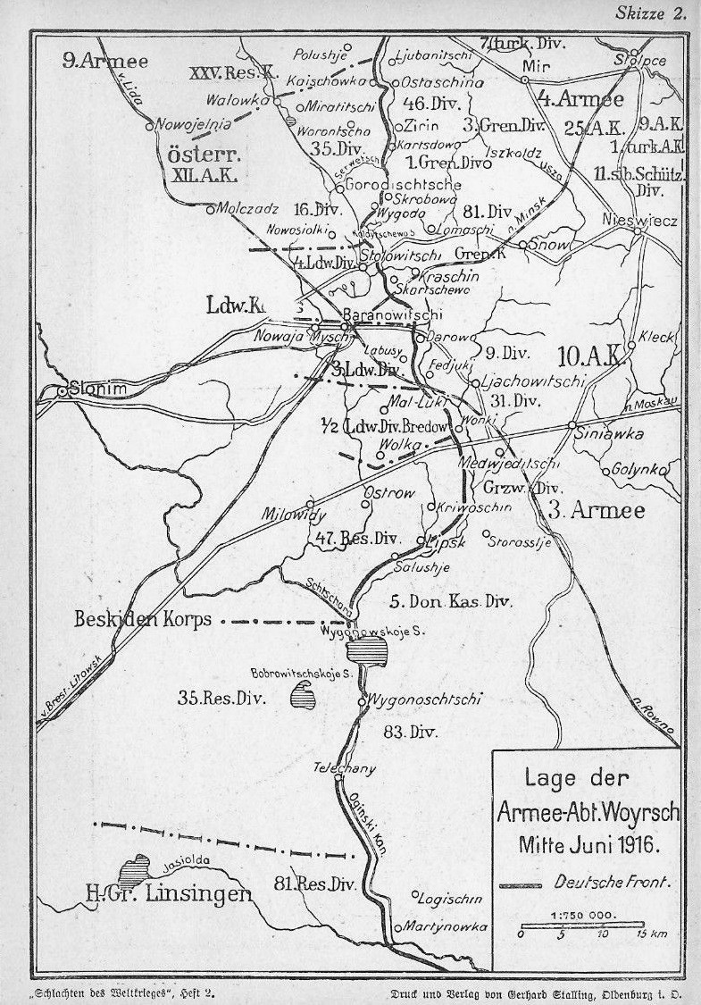 Ein Übersichtskarte von Branowitschi 1916